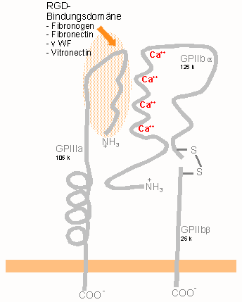 selbst angefertigte Zeichnung zu "Integrine" Lizenzstatus: GNU FDL Juergen Bode 07:05, 9. Jul 2004 (CEST)